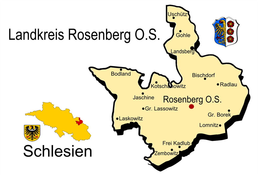 Karte des Landkreises Rosenberg O.S.